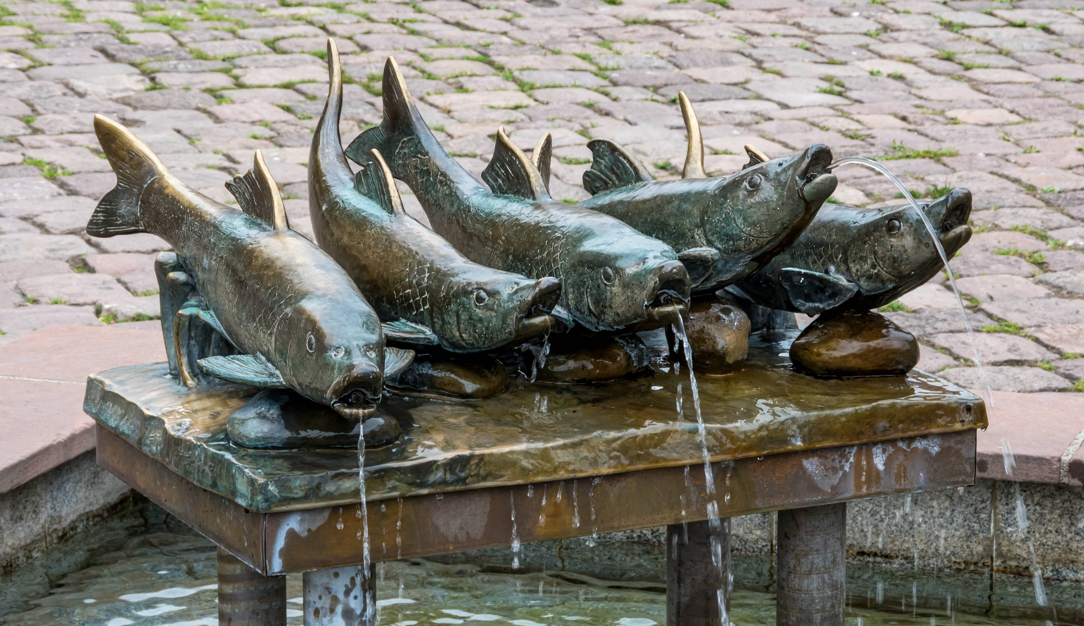 Bilder aus Freudenstadt